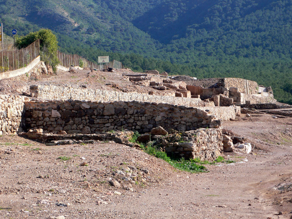 restos arqueológicos de la villa romana del Paturro en Portmán (La Unión, Región de Murcia)